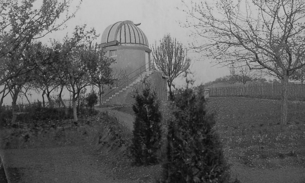 Privates Observatorium von Hans Rosenberg in der Hauffstraße 20 auf dem Österberg in Tübingen